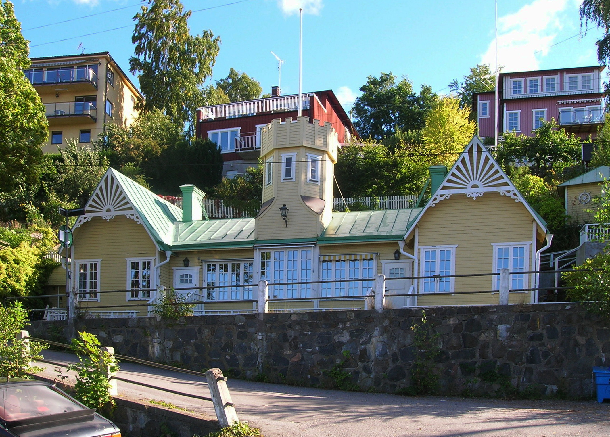 Bredablick, ett sommarnöje från slutet av 1800-talet vid Pettersbergsvägen, Mälarhöjden, Stockholm